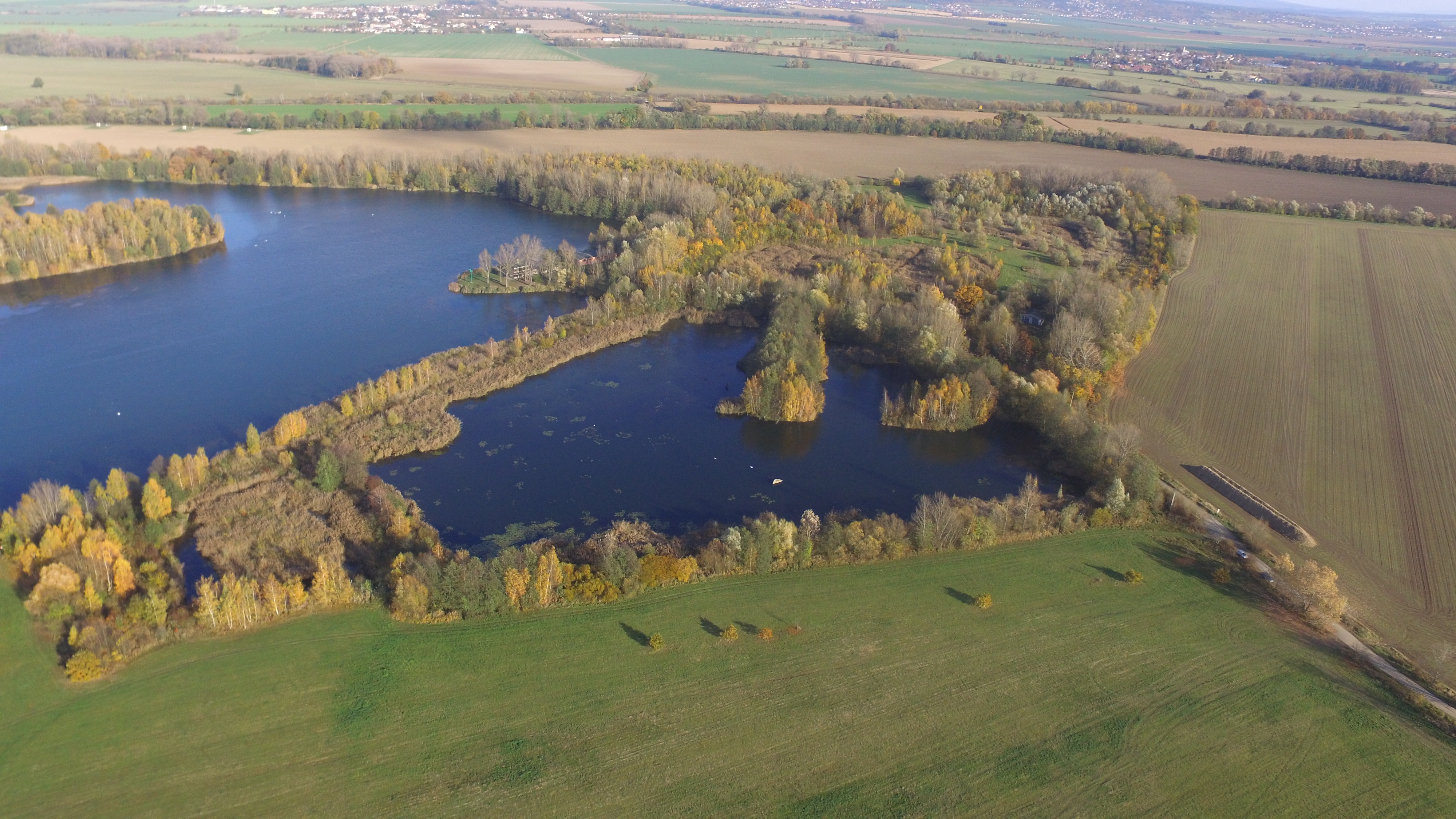 Pohled z výšky 180m